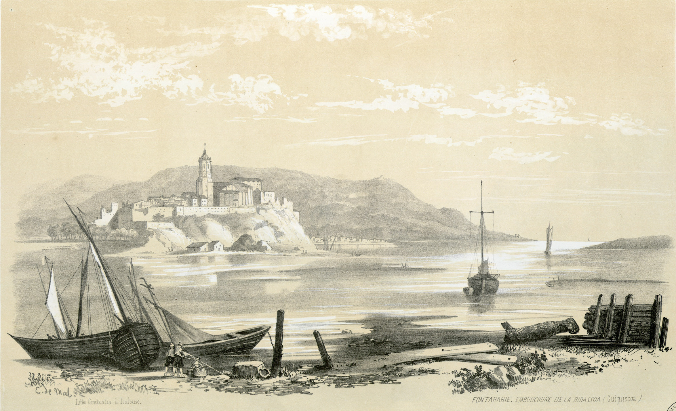 Fait partie d'un recueil de 15 planches lithographiées en camaïeu avec titre lithographié Ancely, René (1876 - 1966). Possesseur